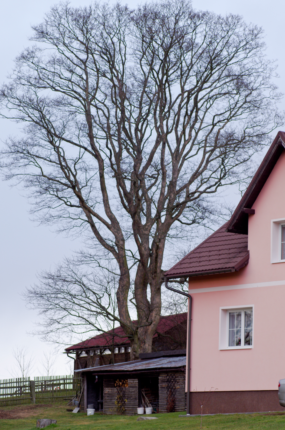 Kostelní Bříza, okres Sokolov, památný klen (1 z dvojice památných stomů), pohled zdálky na menší z klenů, jehož korunu utvářejí do lyrovitého tvaru tři silné kosterní větve.